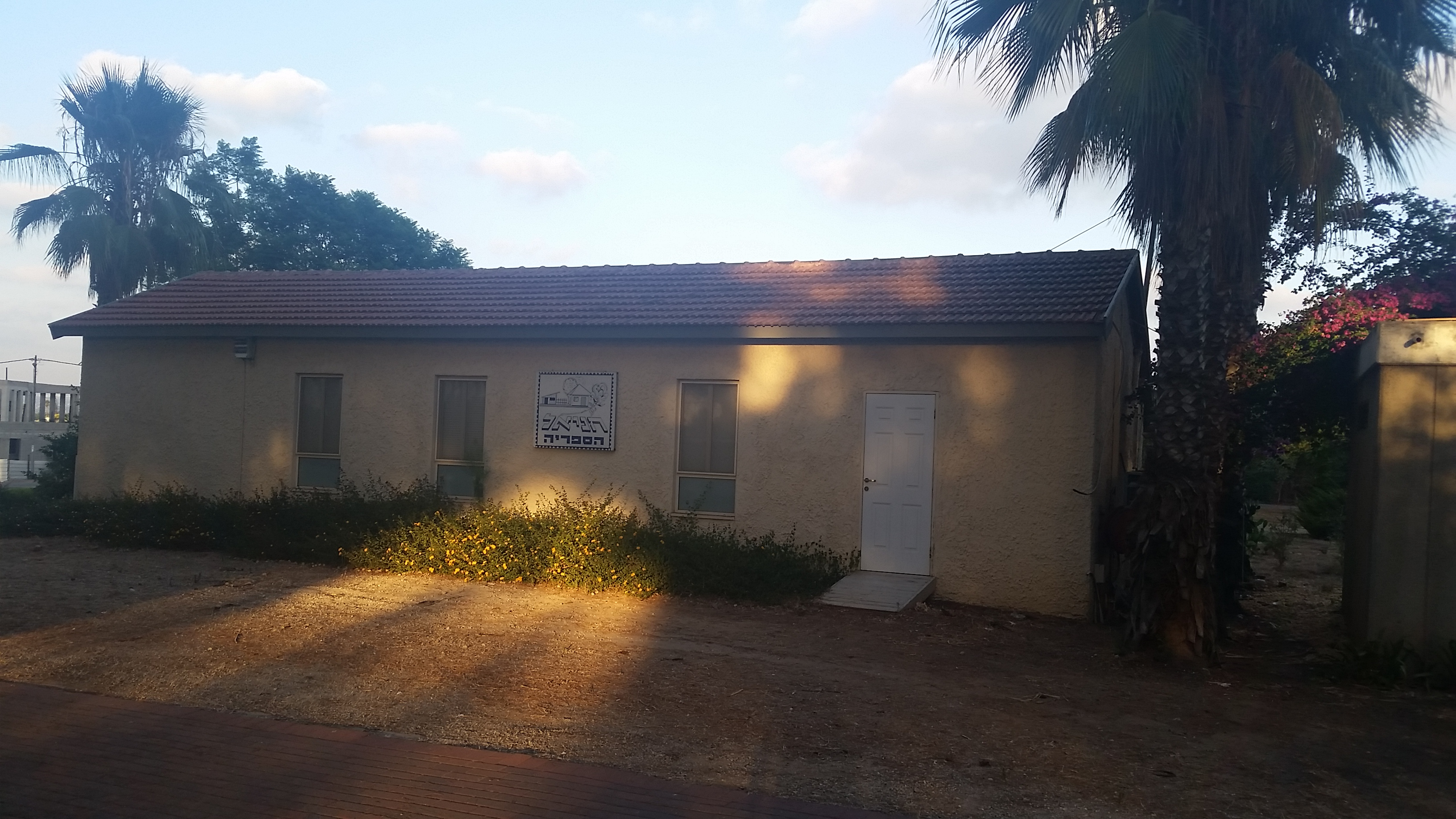 הספריה בחניאל